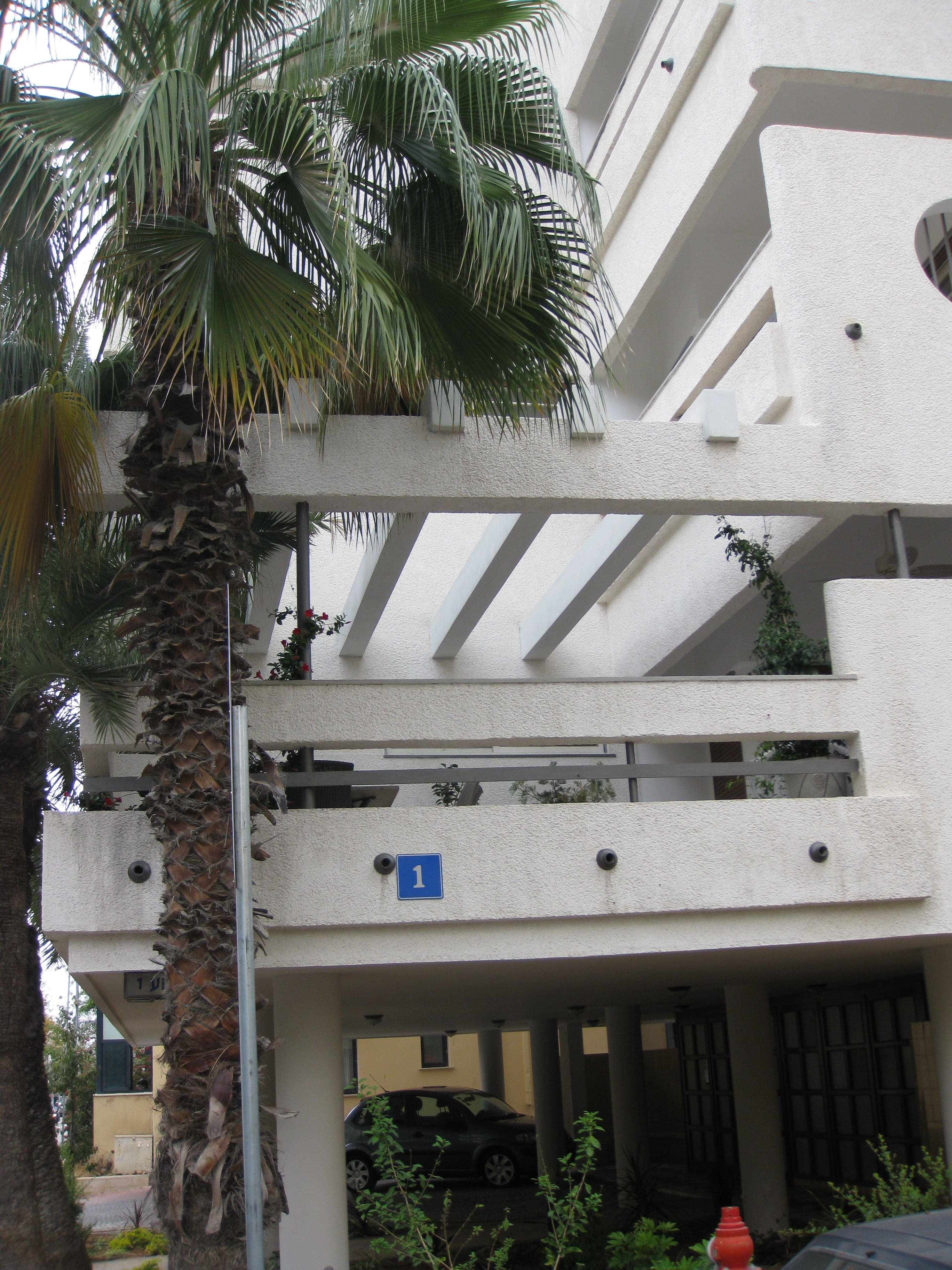 Beit Rabinsky בית רבינסקי